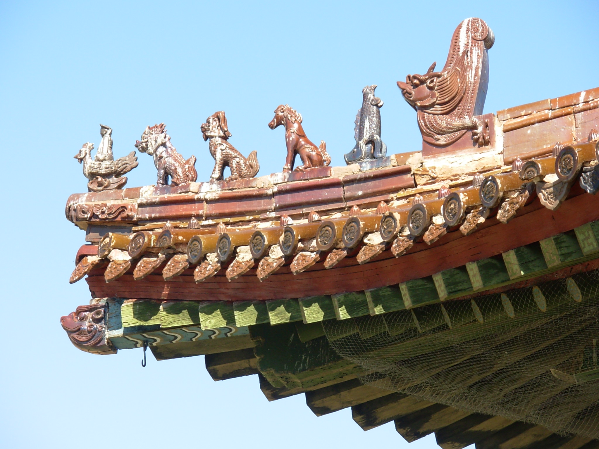 Amarbayasgalant Khiid — Buddhist monastery in Mongolia.